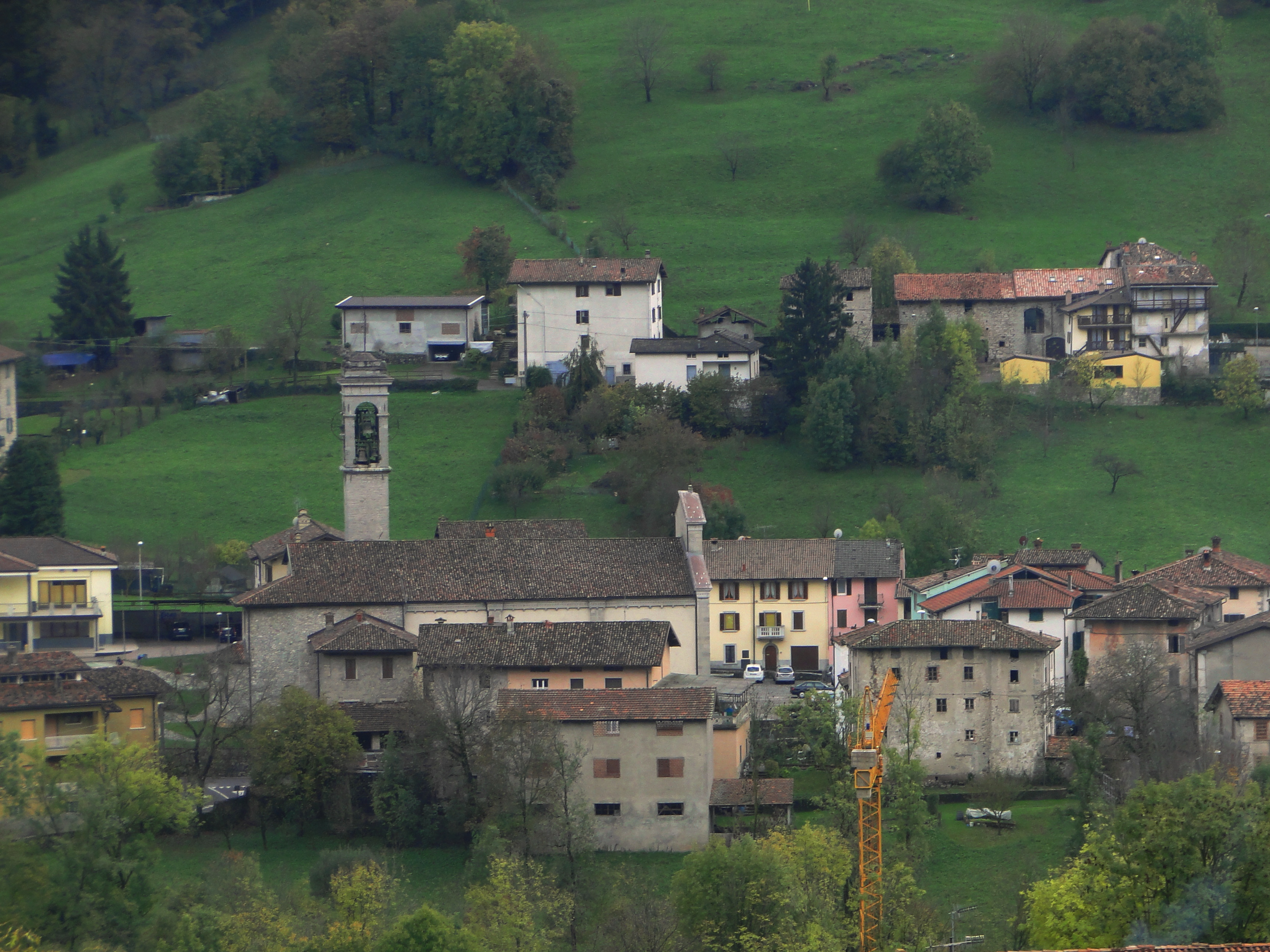 Vista di Abbazia, fraz. di Albino (BG).